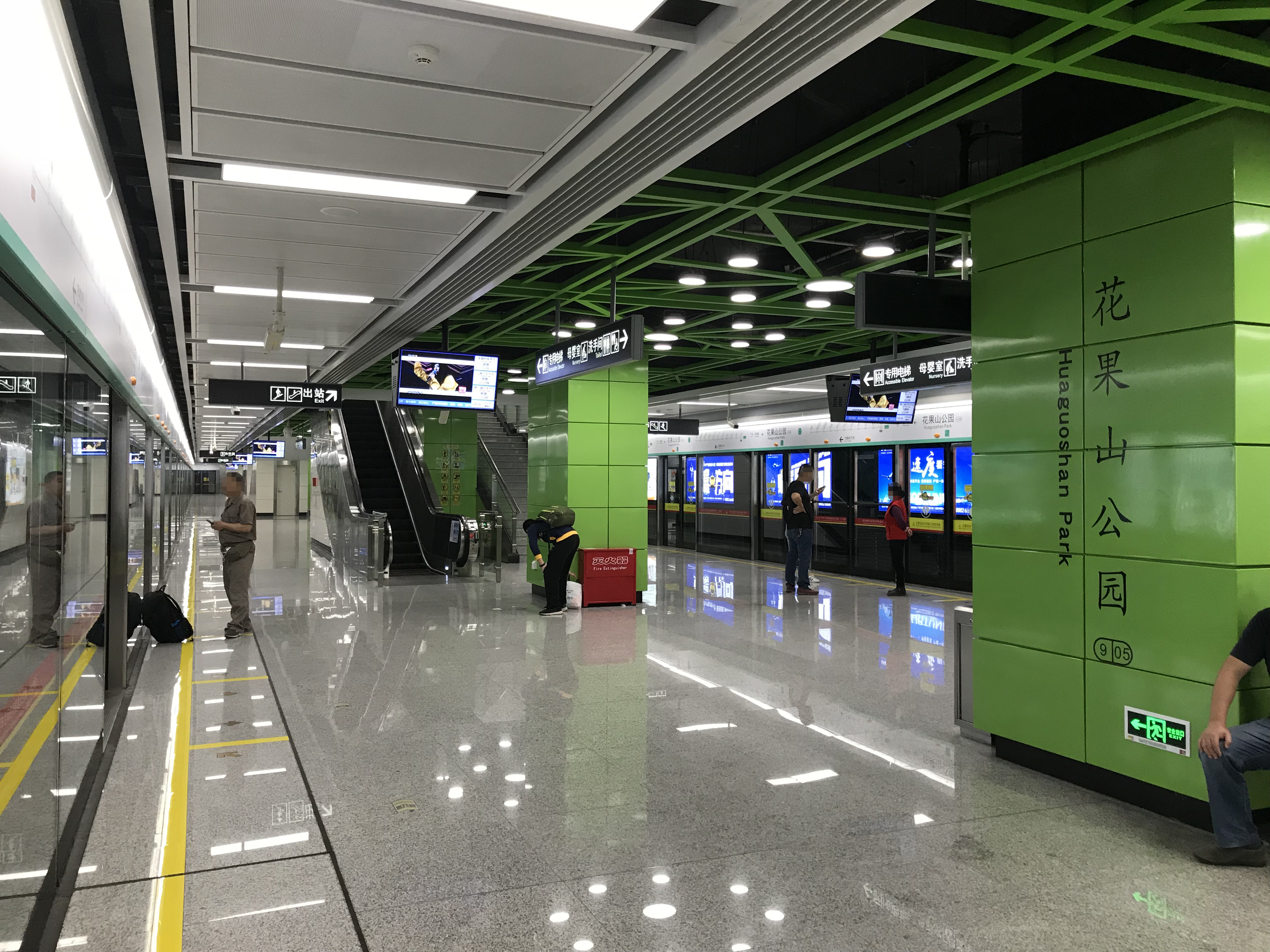 广州地铁花果山公园站